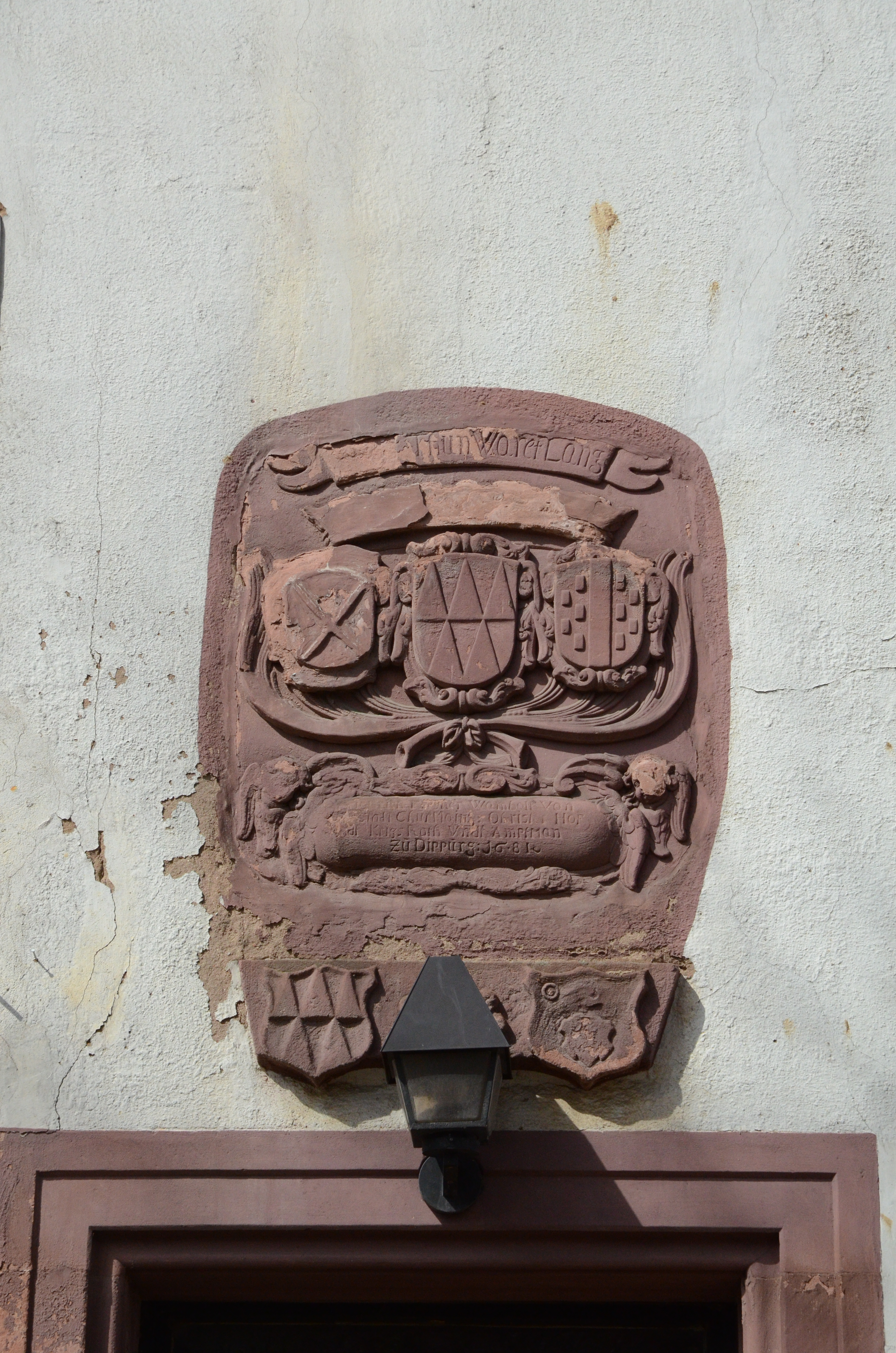 Groß-Umstadt Wamboltsches Schloss